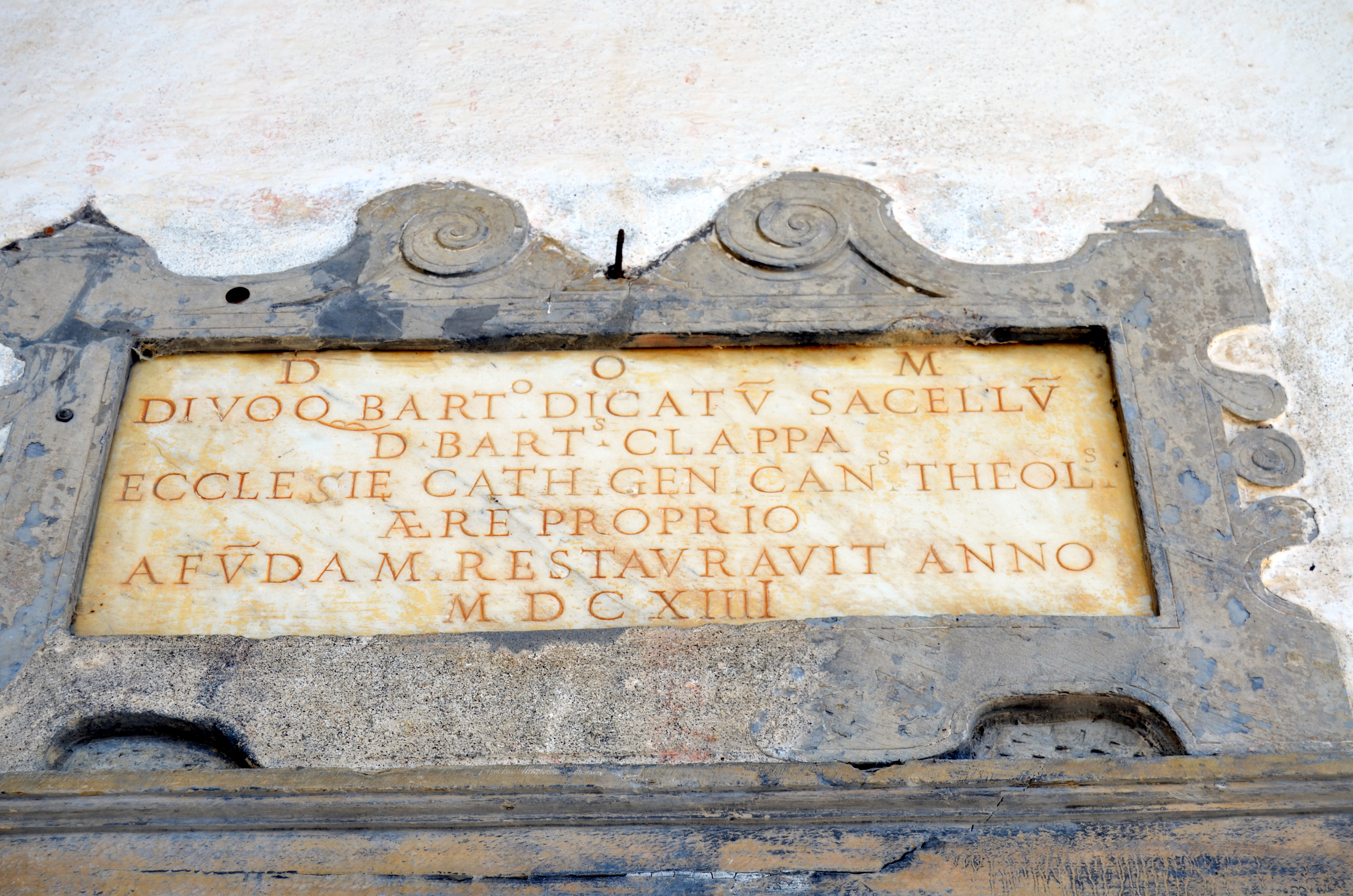 Cappella di San Bartolomeo, Cogorno, Liguria, Italy